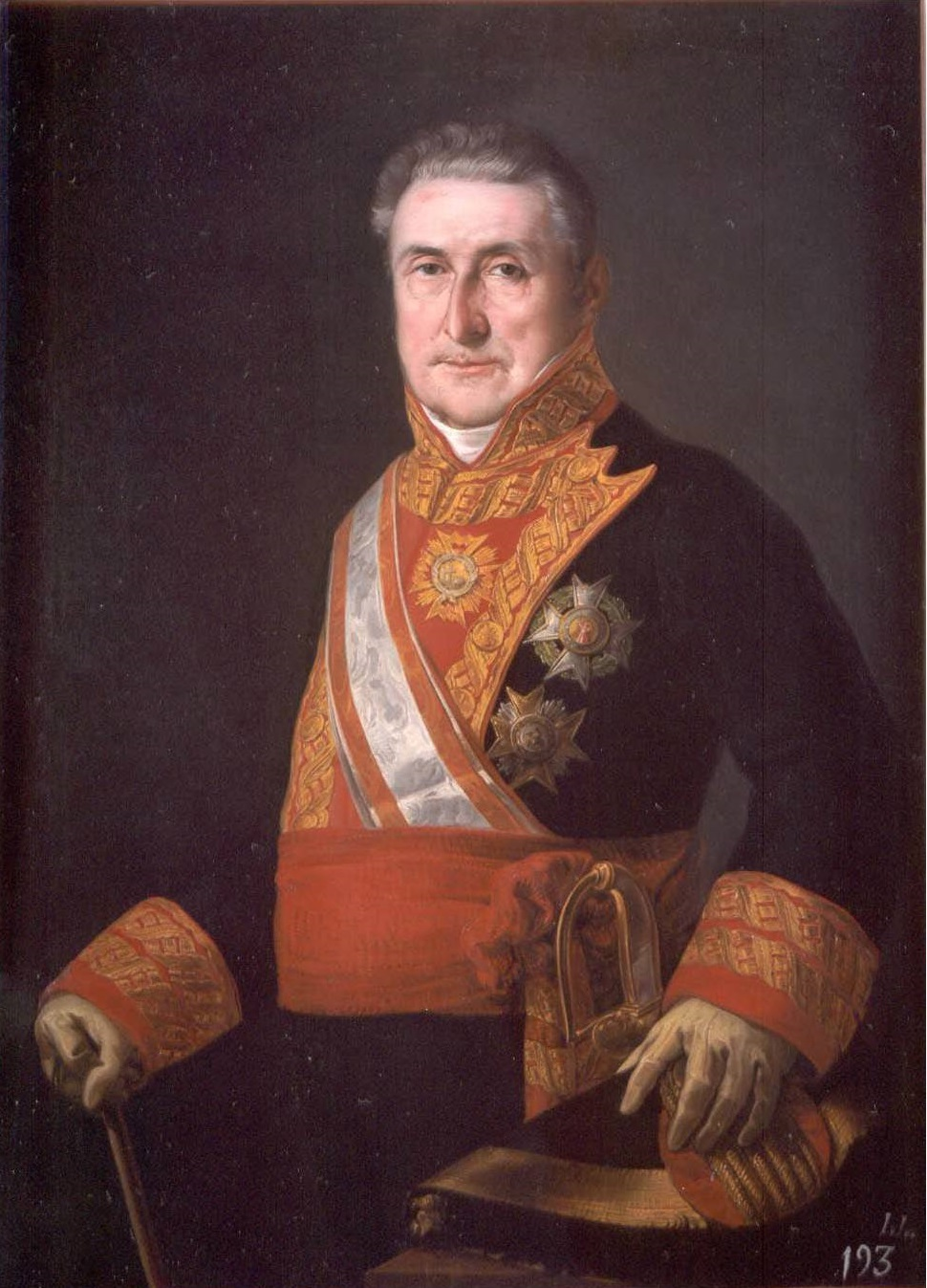 Retrato del militar español José María Carvajal Urrutia (1762-1832), que llegó a ser teniente general del ejército español, capitán general de los reinos de Valencia y Murcia y caballero Gran Cruz de las Ordenes de San Fernando y San Hermenegildo, y académico de Honor de la Real Academia de Bellas Artes de San Carlos de Valencia. Además, el retratado aparece de mas de medio cuerpo, con uniforme de capitán general, y luciendo, entre otras, la banda y la placa de la Orden de Isabel la Católica y las cruces de San Fernando y San Hermenegildo. Con la mano izquierda se apoya en el bastón de mando y con la derecha sostiene el bicornio. Y es uno de los mejores retratos realizados por Parra, al que representa con dignidad, y verismo. Destaca el detallismo y minuciosidad en la captación de los detalles del uniforme, y la profundidad psicológica conseguida en el rostro del militar.